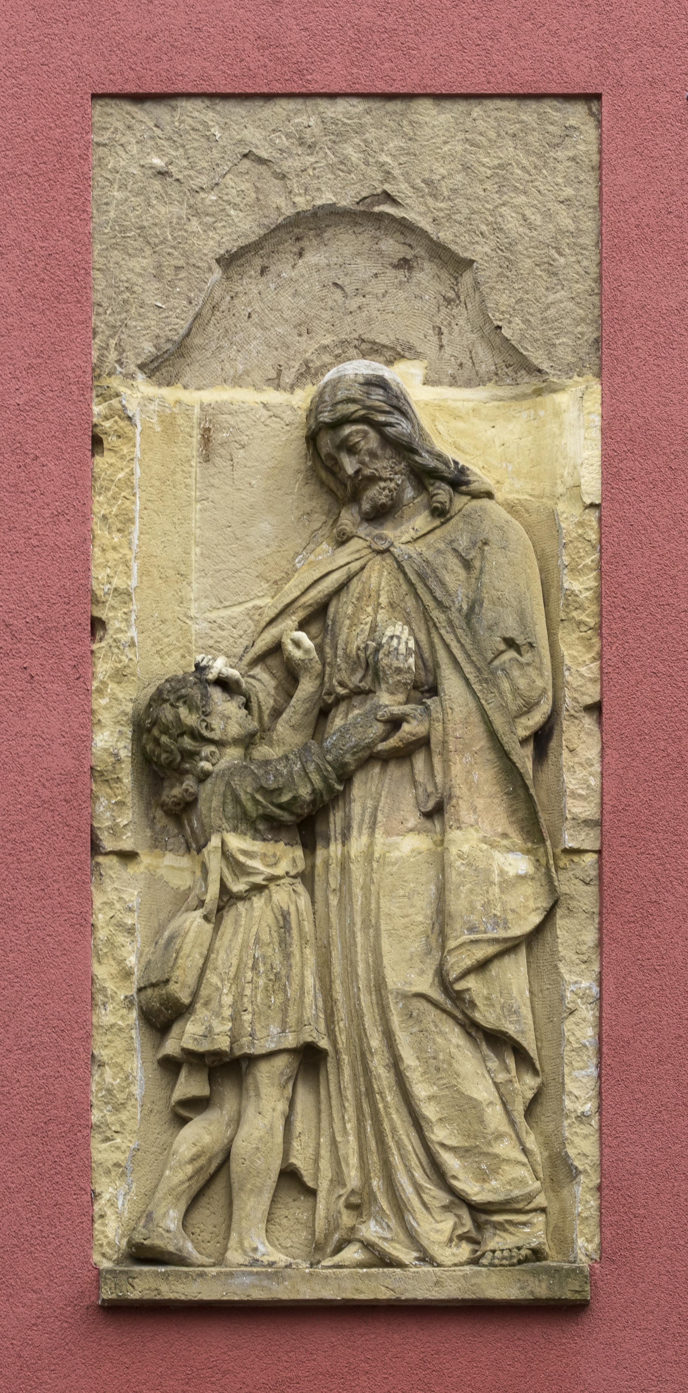 Gebäude in Freiburg im Breisgau